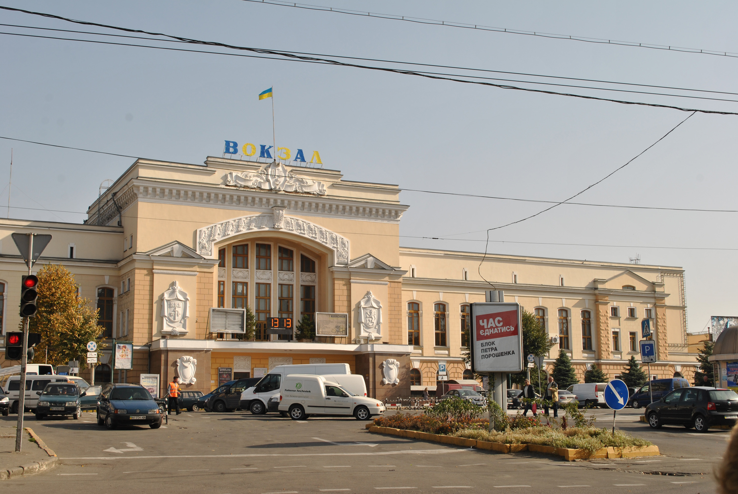 Двірець (мурований) залізничного вокзалу станції Тернопіль, м. Тернопіль, Привокзальний майдан.